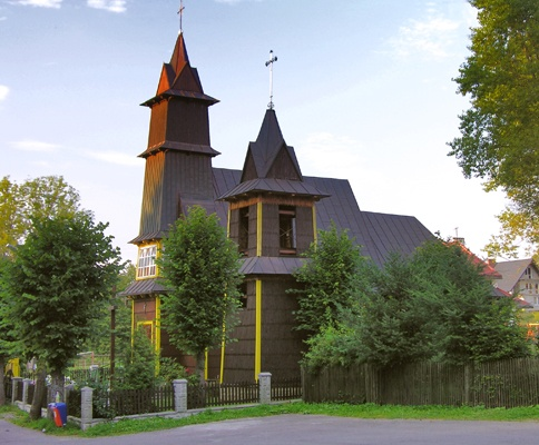 Kościół pw. Najświętszej Marii Panny w Soblówce